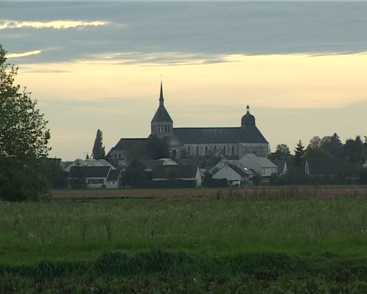 Abbaye de Saint-Benoît-sur-Loire (photogramme extrait du documentaire)